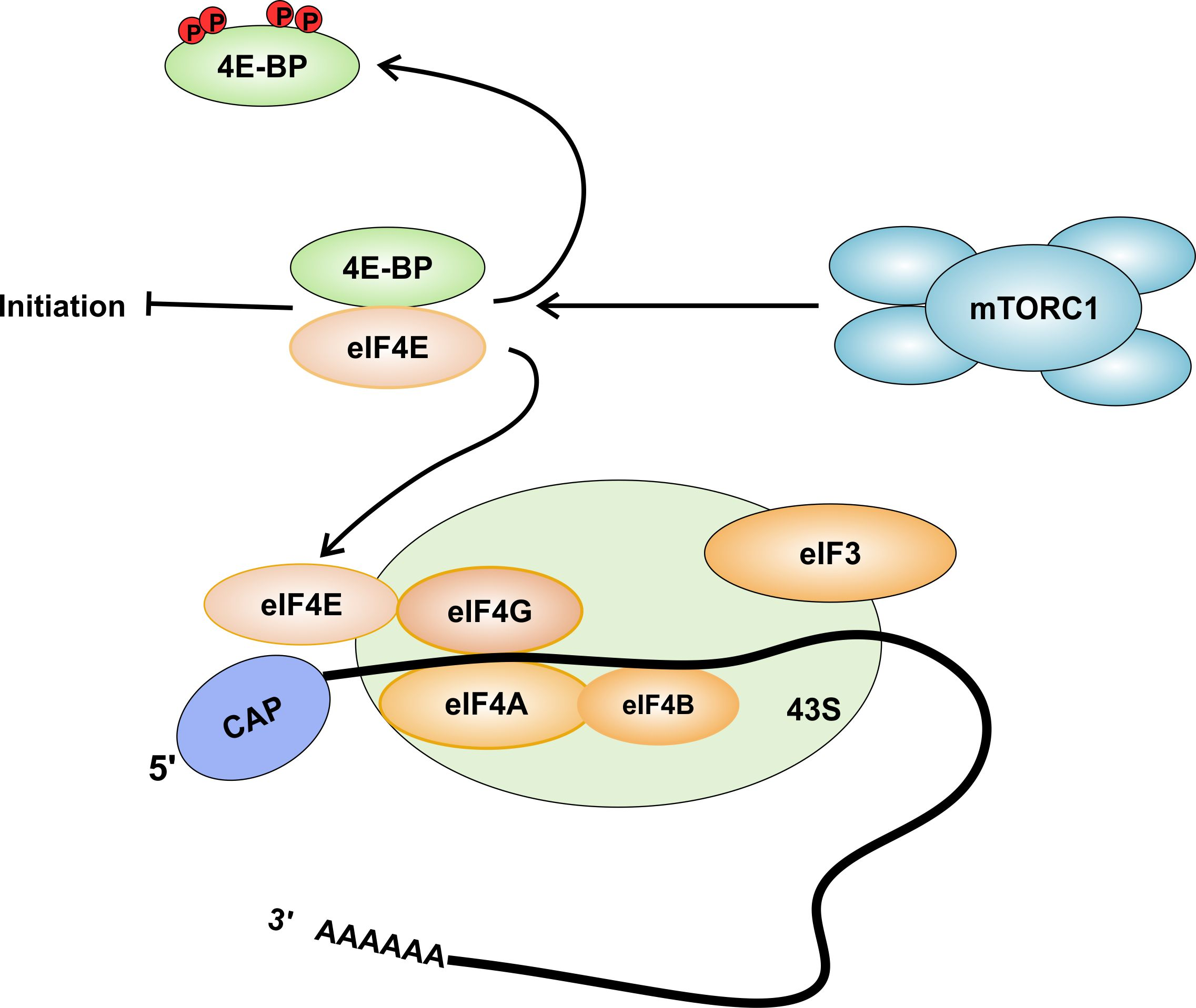 D'après Yann Cormerais Acides aminés et cancer thèse Uni. Nice Sophia Antipolis Contrôle de la synthèse protéique par mTORC1. Lorsque mTORC1 est activé, 4E-BP est phosphorylé et relargue eIF4E permettant ainsi le recrutement de eIF4G, eIF4A, eIF4B au niveau de la coiffe de l'ARN messager et entrainant l'initiation de la traduction